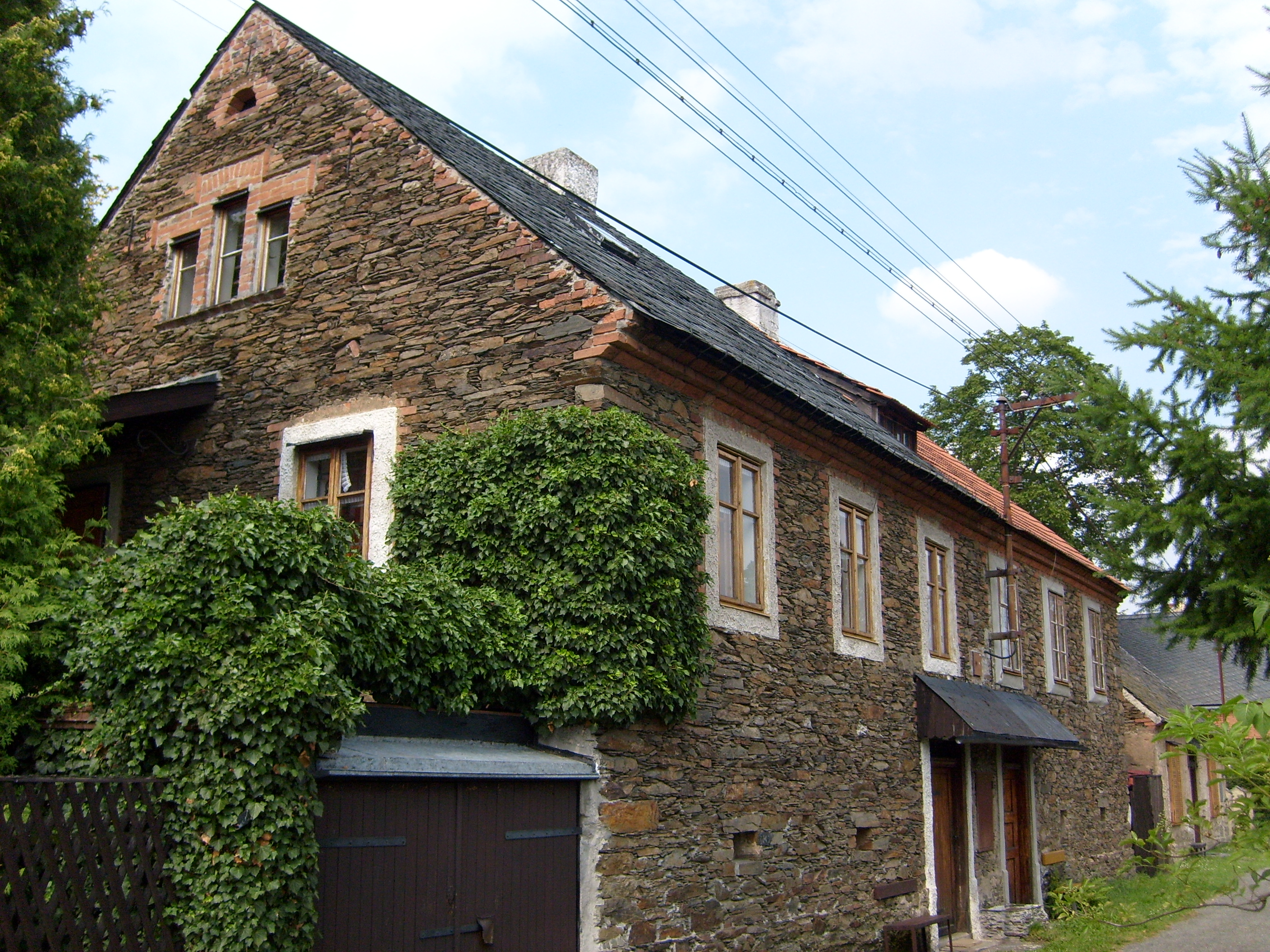 Rabštejn nad Střelou, Plzeň region, Czech Republic